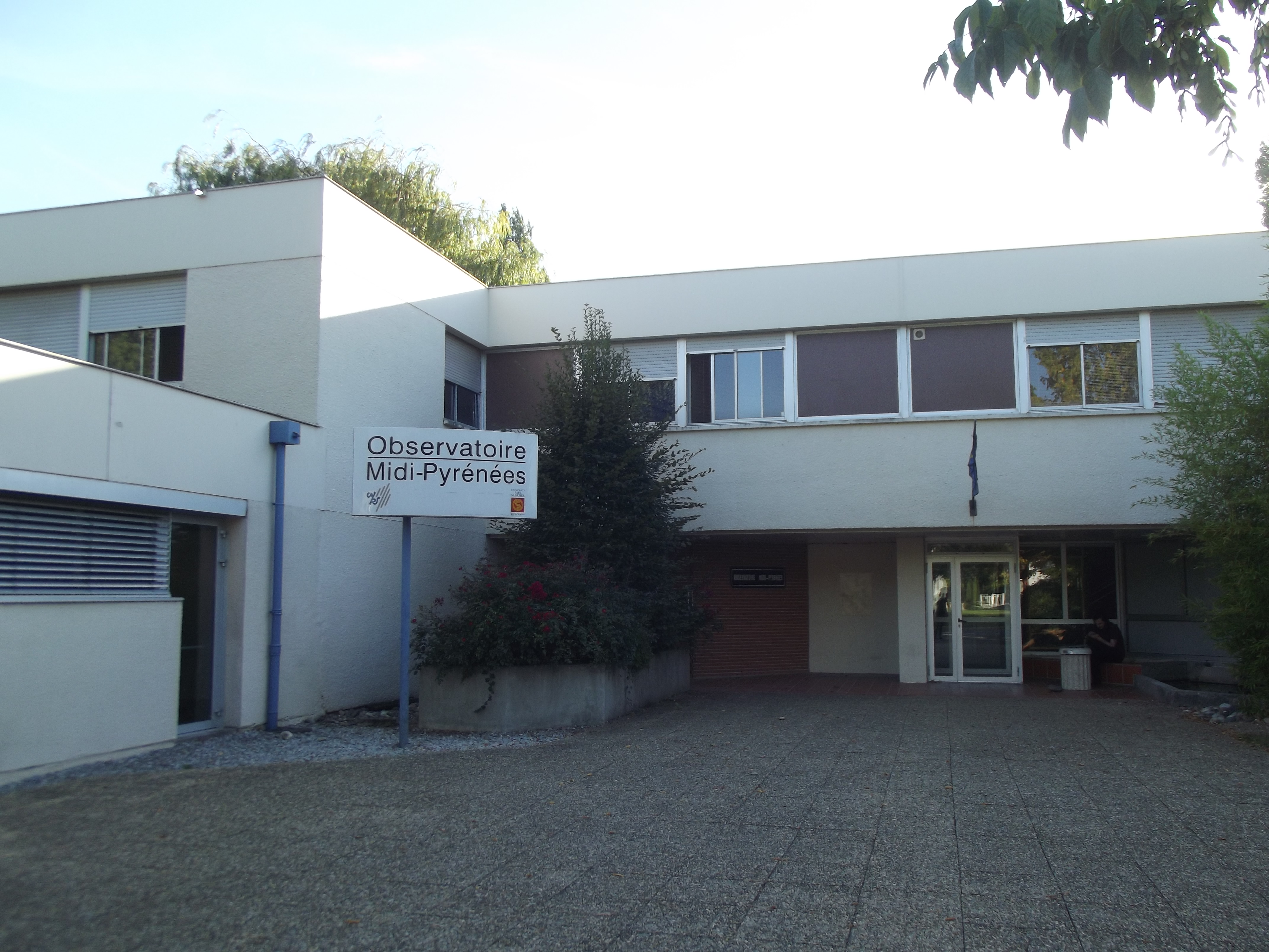 Observatoire Midi-Pyrénées, Toulouse, France